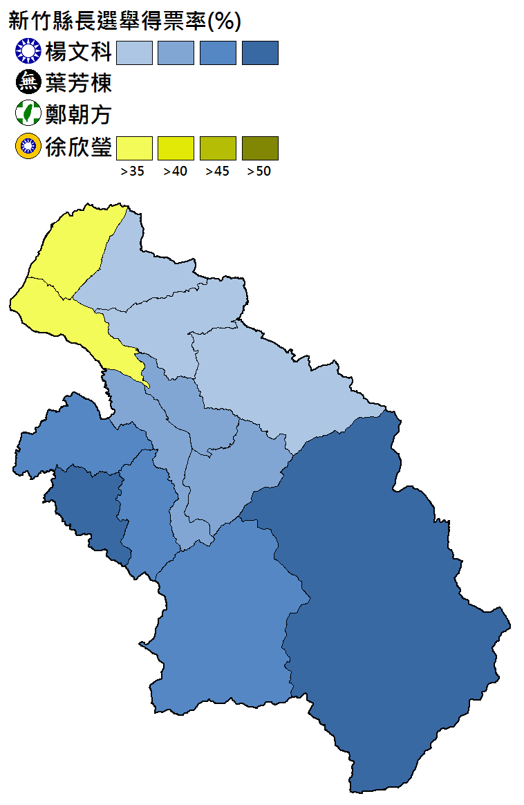 新竹縣長選舉得票分布。